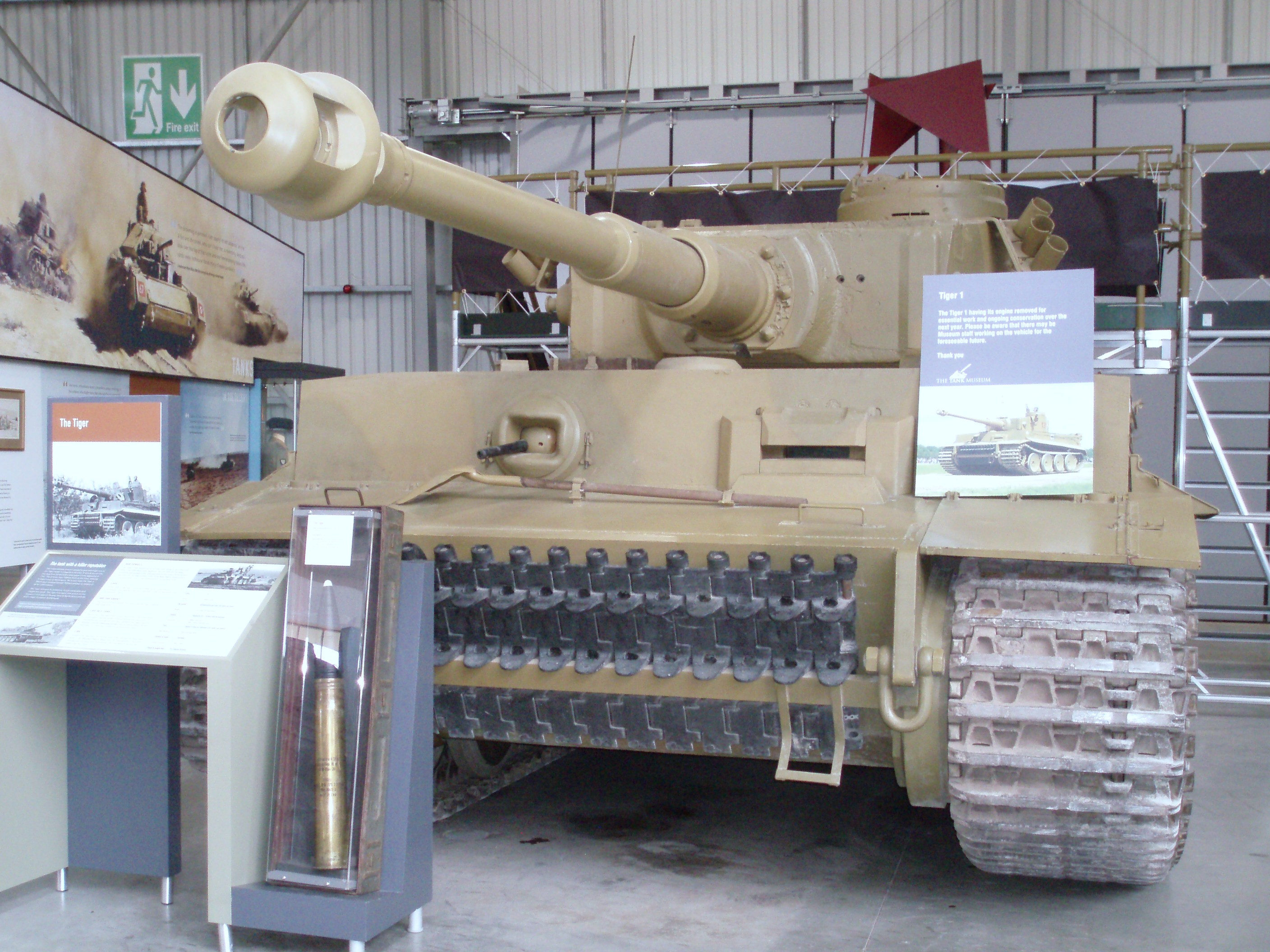 Bovington Tank Museum 062 Tiger 1